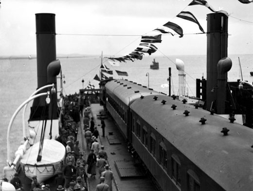 南京下关-浦口间的火车轮渡搭载客车过江 1933年10月22日，中国南京市下关煤炭港至浦口开通了中国首个火车轮渡。